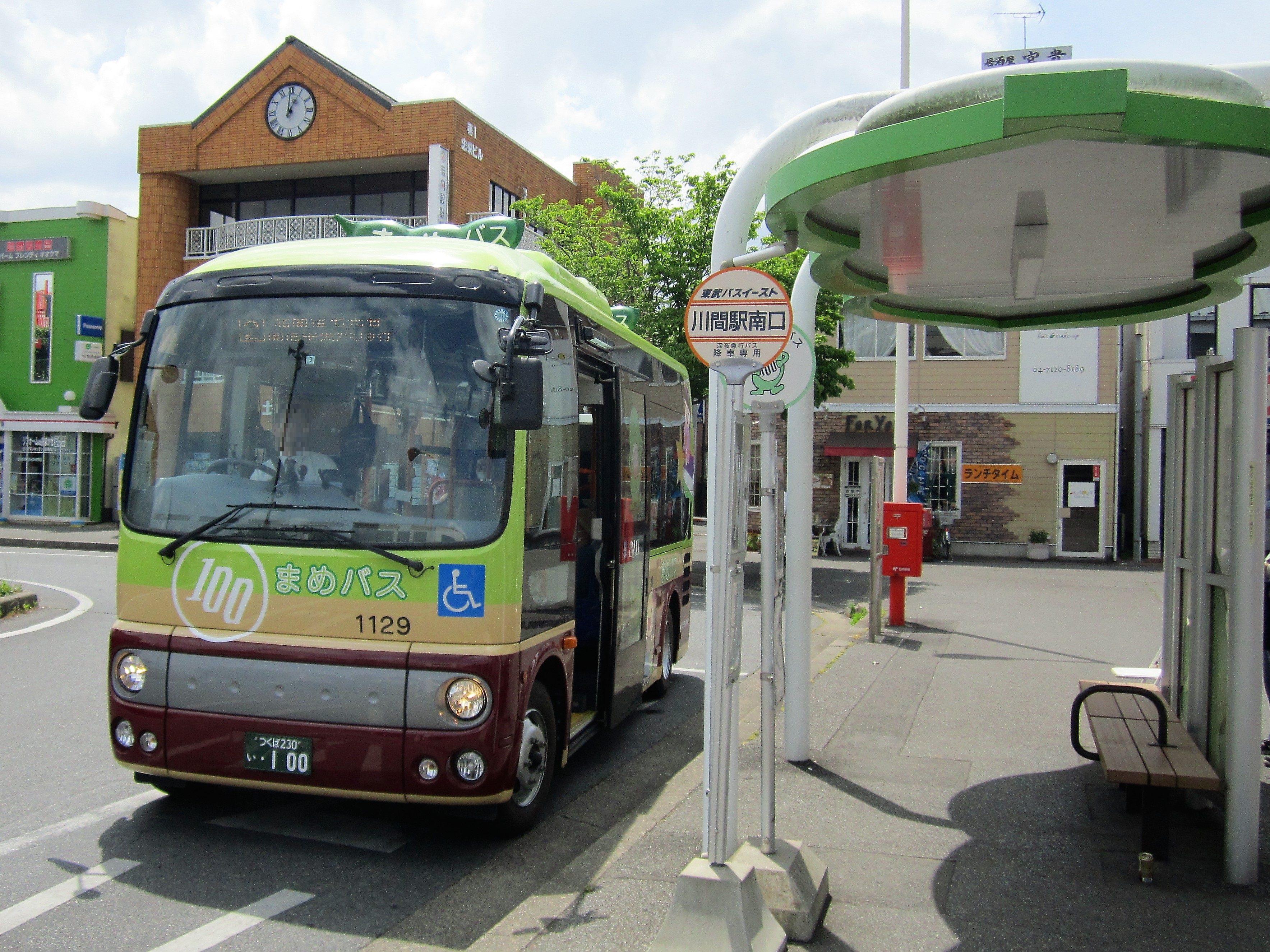 まめバス（朝日自動車車両、川間駅南口） Canon PowerShot A2200